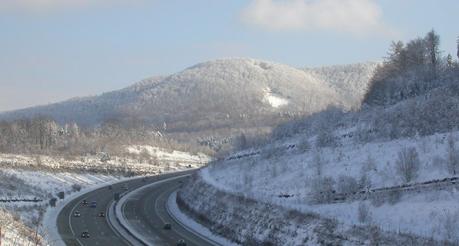 Boßler near Gruibingen, Baden-Württemberg.